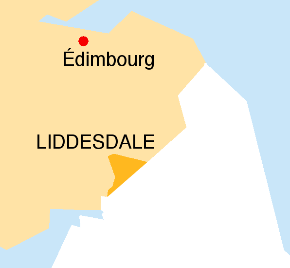 Localisation de l'ancienne province écossaise du Liddesdale, théâtre de deux œuvres de Walter Scott : Le Nain noir (The Black Dwarf) et La Mort du Laird's Jock (Death of the Laird's Jock). Très schématisé, sans garantie de précision. Je m'inspire de Map of Scotland within the United Kingdom.svg, de Peeperman, 2012, pour le tracé des côtes. Et d'une carte du Liddesdale d'Herman Moll (vers 1654-1732) pour le tracé du Liddesdale.